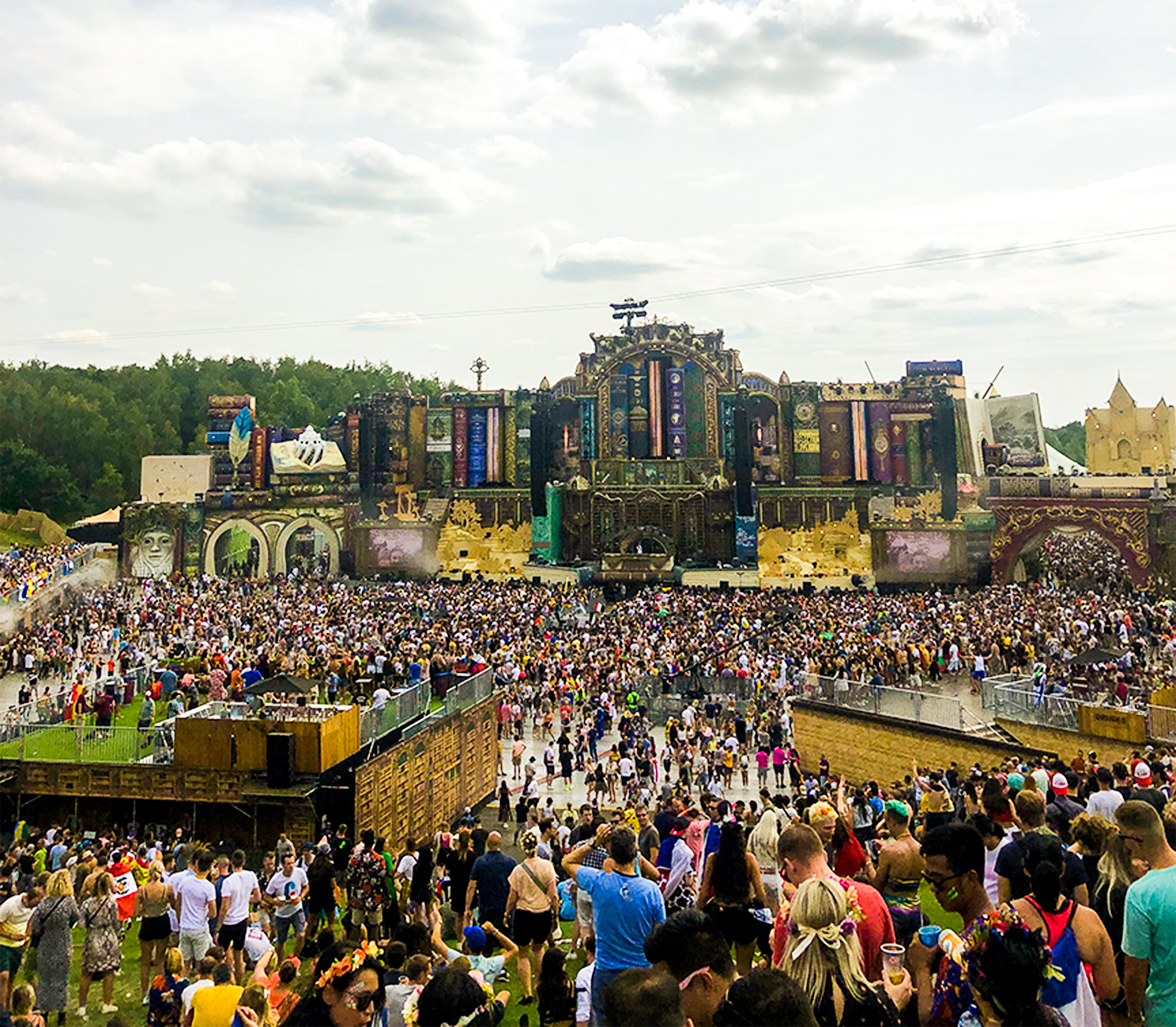 Scène principale du festival Tomorrowland en Belgique, le 19 juillet 2019